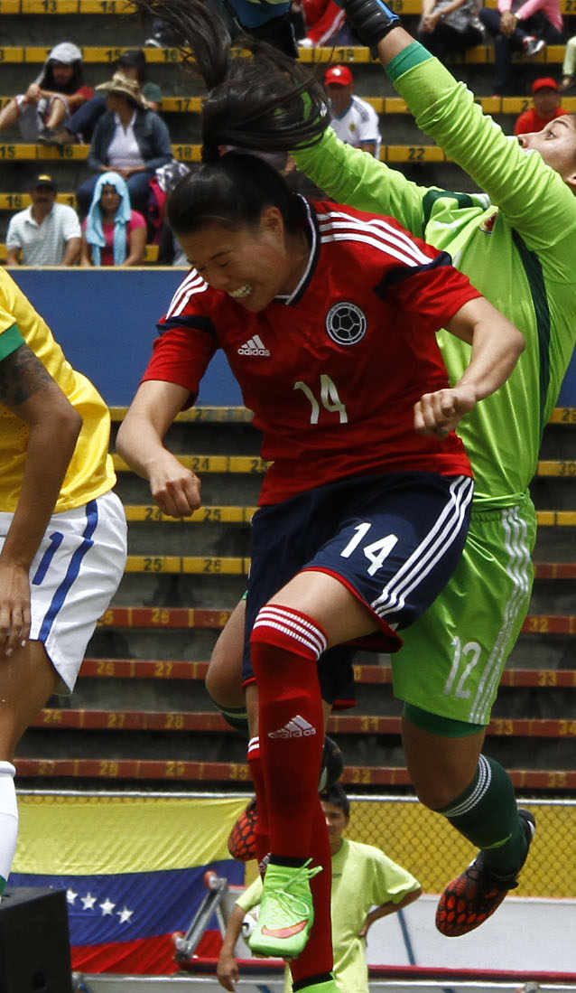 Quito, 28 sep (Andes).- La selección brasileña femenina de fútbol se proclamó Campeona de la Copa América de Fútbol Ecuador 2014. Foto: Micaela Ayala V./Andes